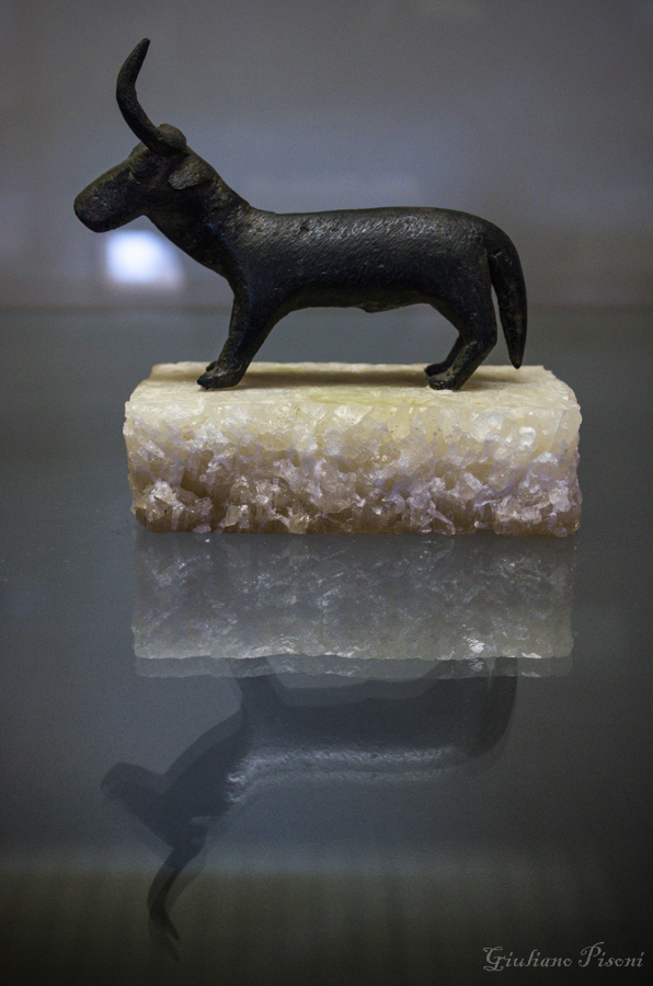 Museo archeologico nazionale Antiquarium turritano - MIBAC This is a photo of a monument which is part of cultural heritage of Italy.